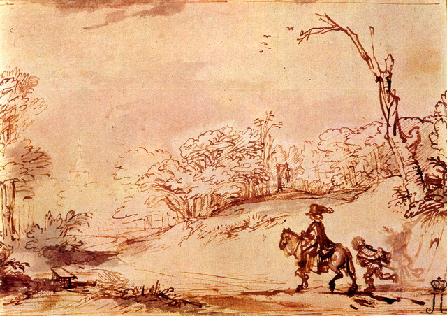 Рембрандт вершник: малюнок